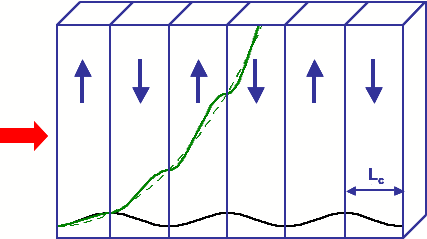 Schéma d'un cristal périodiquement retourné, et évolution de l'intensité générée par effet paramétrique avec (vert) ou sans (noir) retournement des domaines. Source : personelle. Licensing Catégorie:Schéma de physique